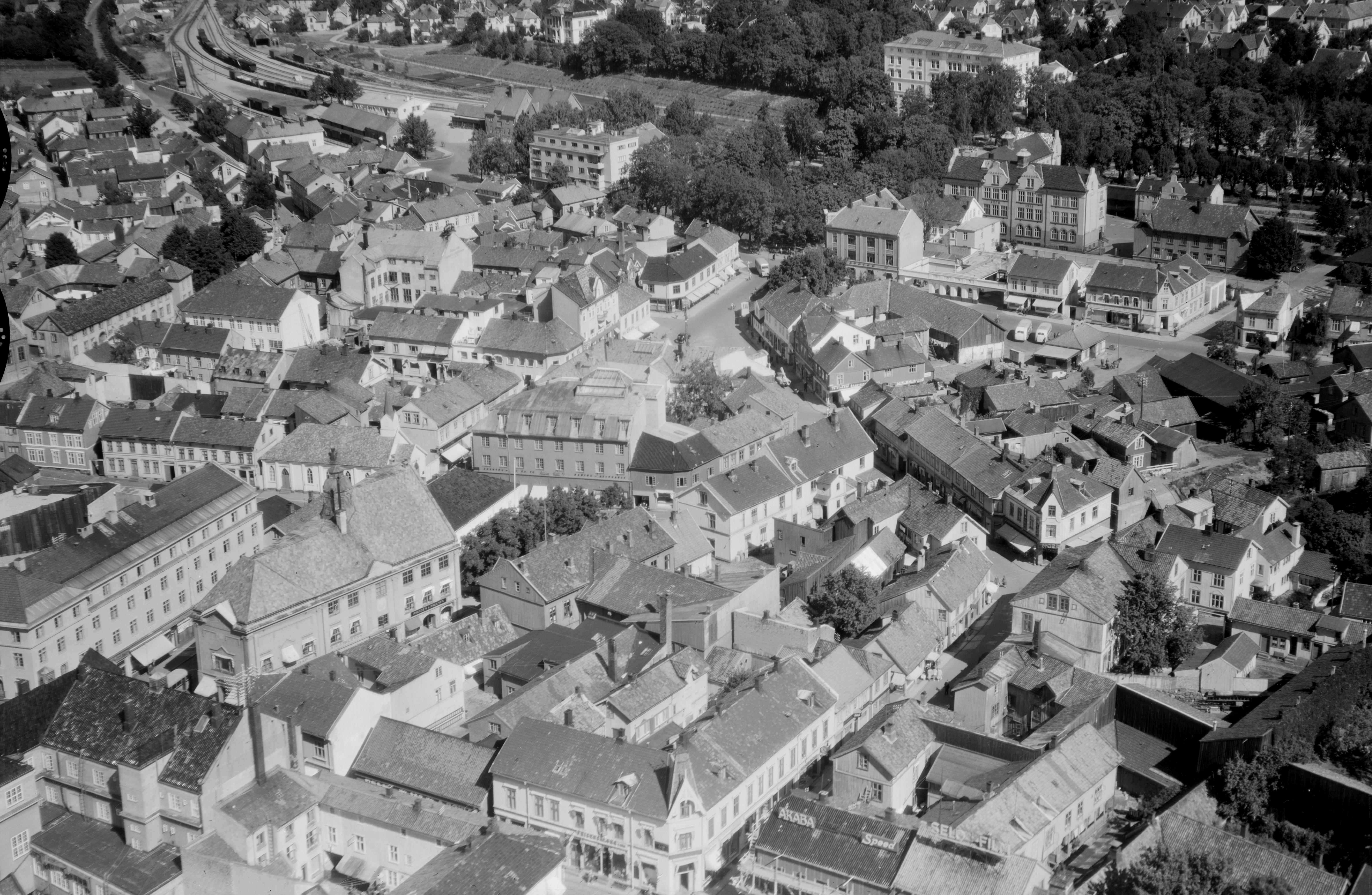 FW.S.18778